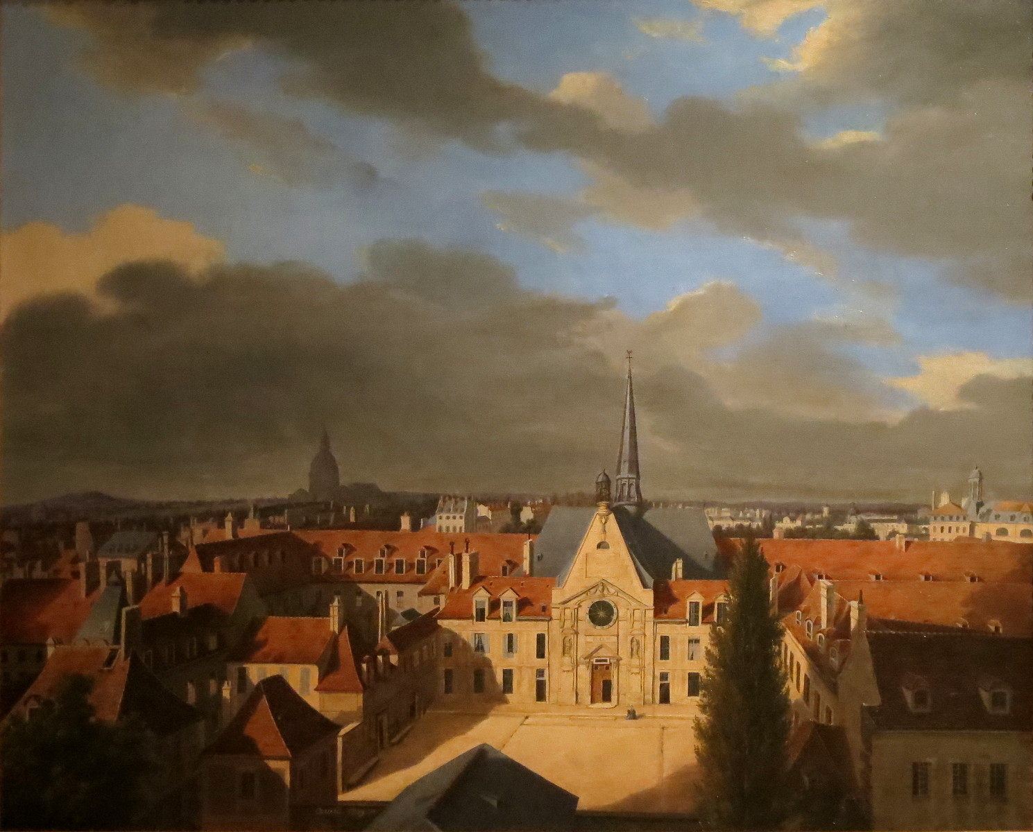 L'hôpital Laënnec